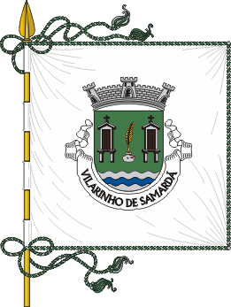 Estandarte da freguesia de Vilarinho de Samardã (concelho de Vila Real)